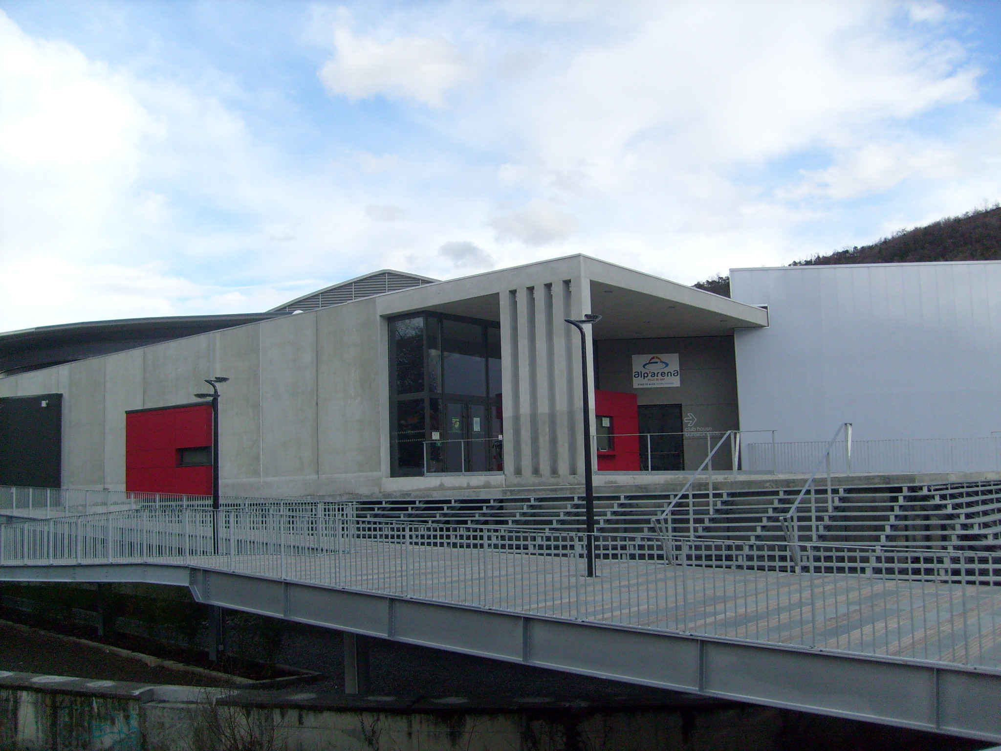 Alp'Arena( entrée du stade de glace)